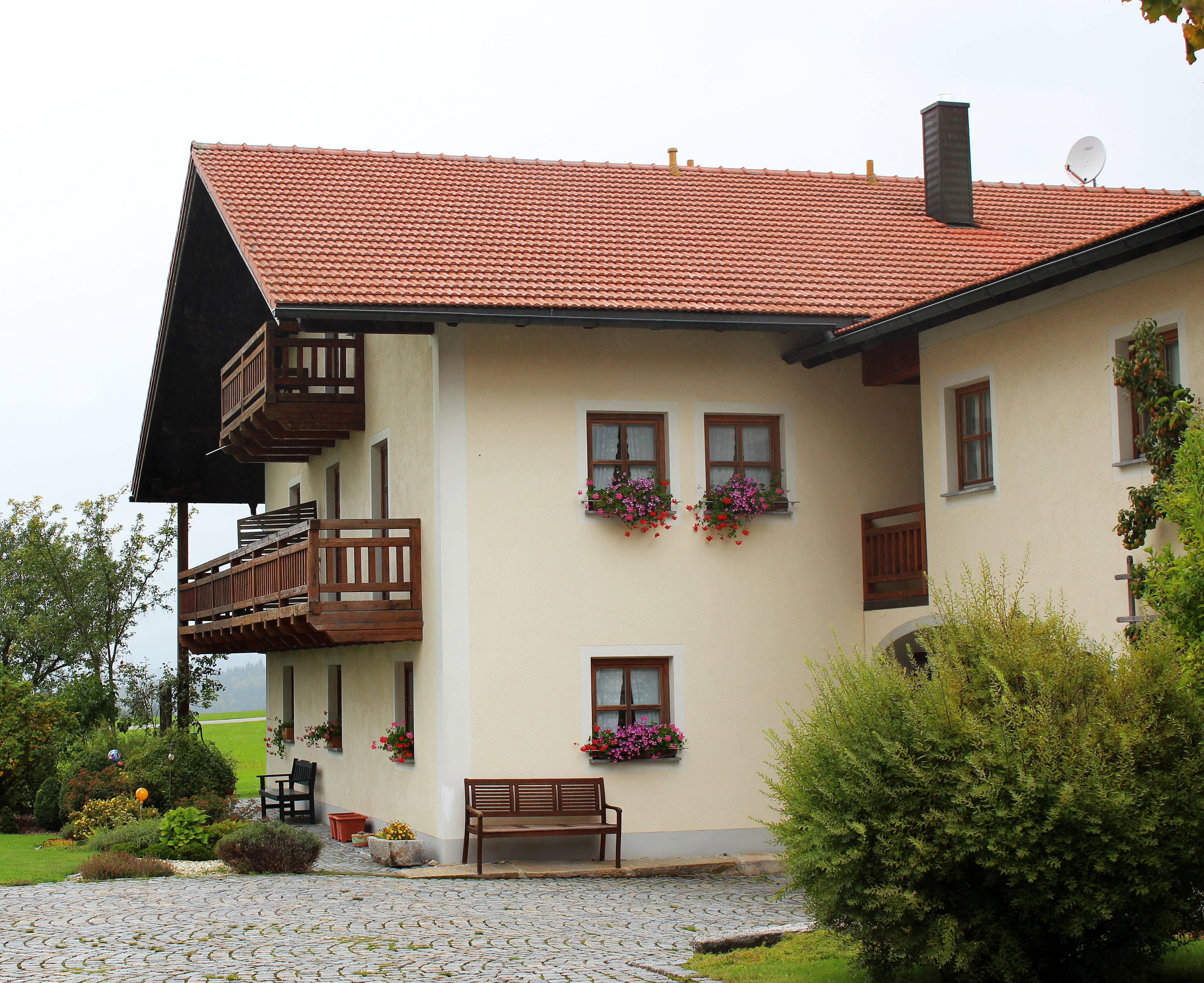 Moderner Anbau am Gasthof Zur Alten Post Herzogsreut)